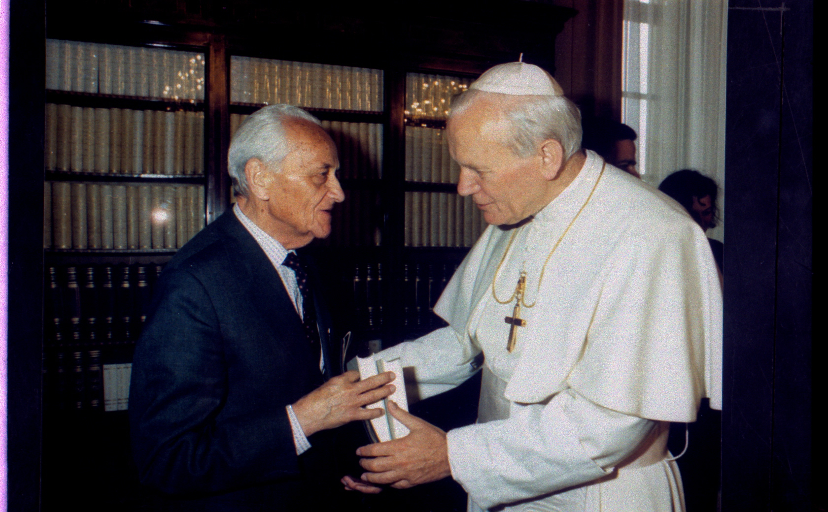 Józef Bogusz, lekarz, z papieżem Janem Pawłem II